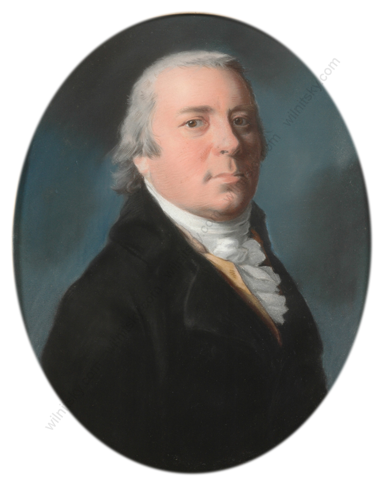 Беларуская (тарашкевіца): Партрэт Антона Радзівіла (Anton Radzivił)